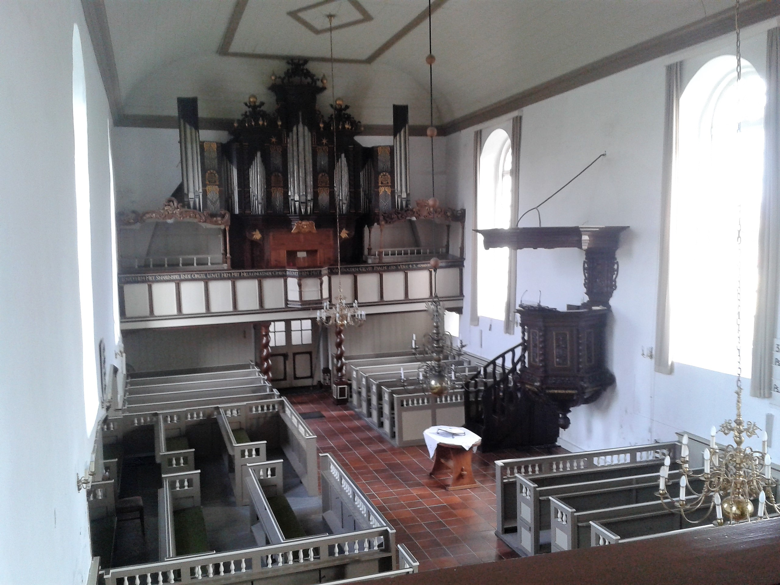 Kirche Visquard, Krummhörn, Landkreis Aurich, Ostfriesland, Deutschland